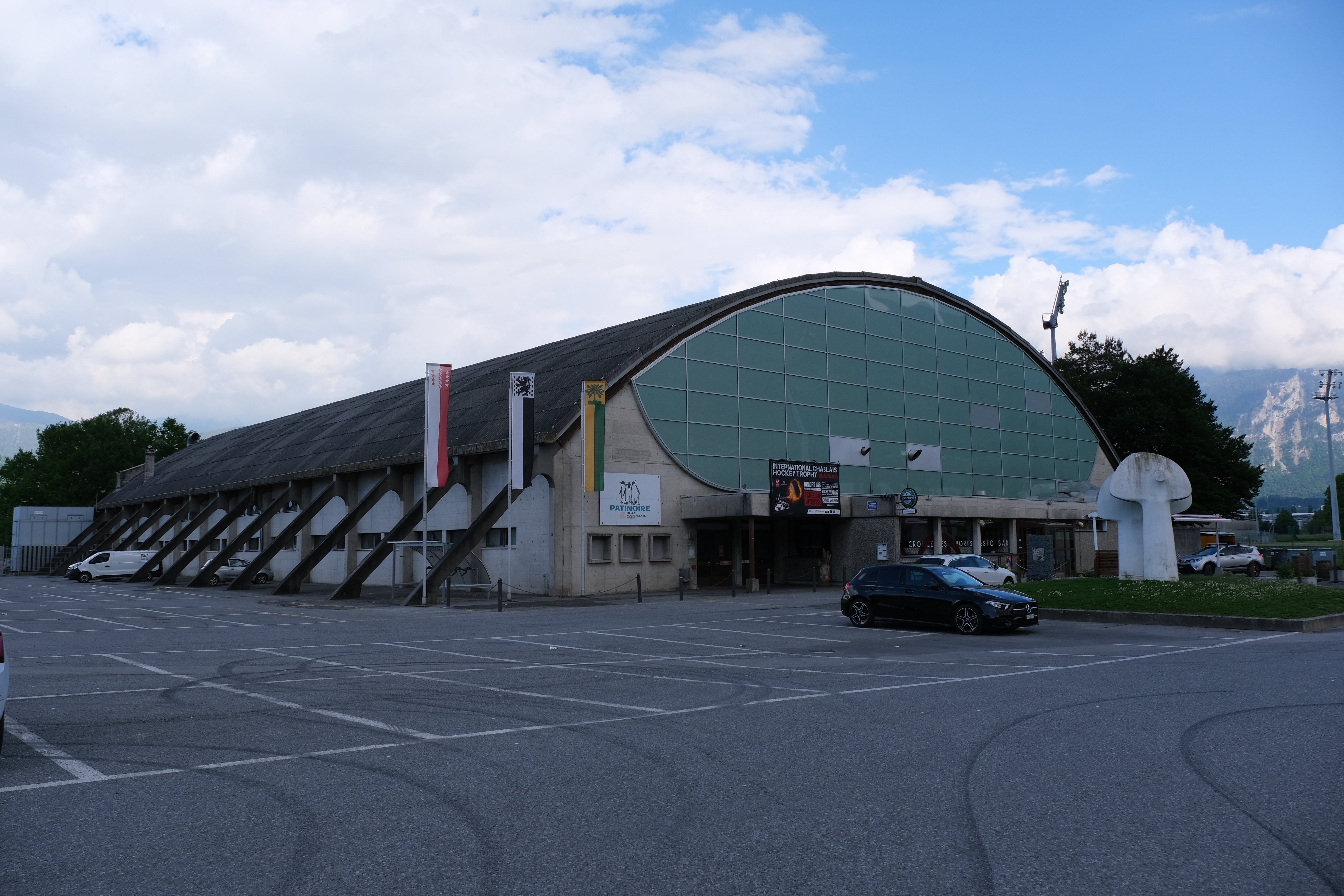 La patinoire du Verney à Monthey en 2020.